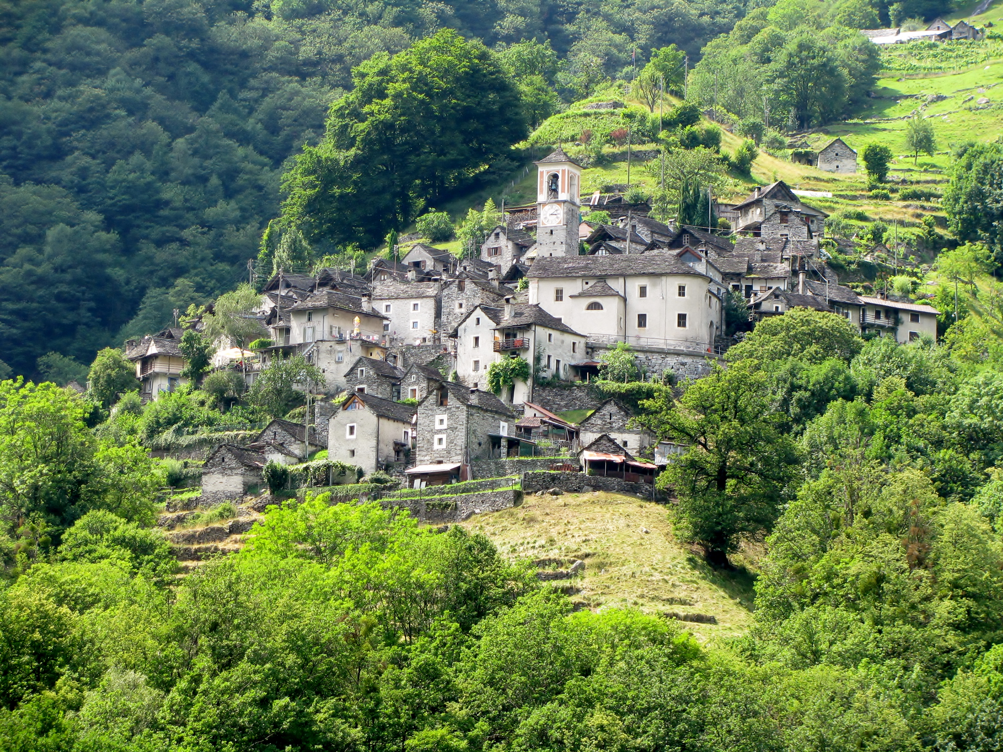 Vista panoramica di Corippo (TI)